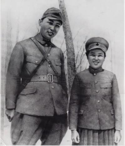 東北抗日聯軍時代の金日成と金正淑